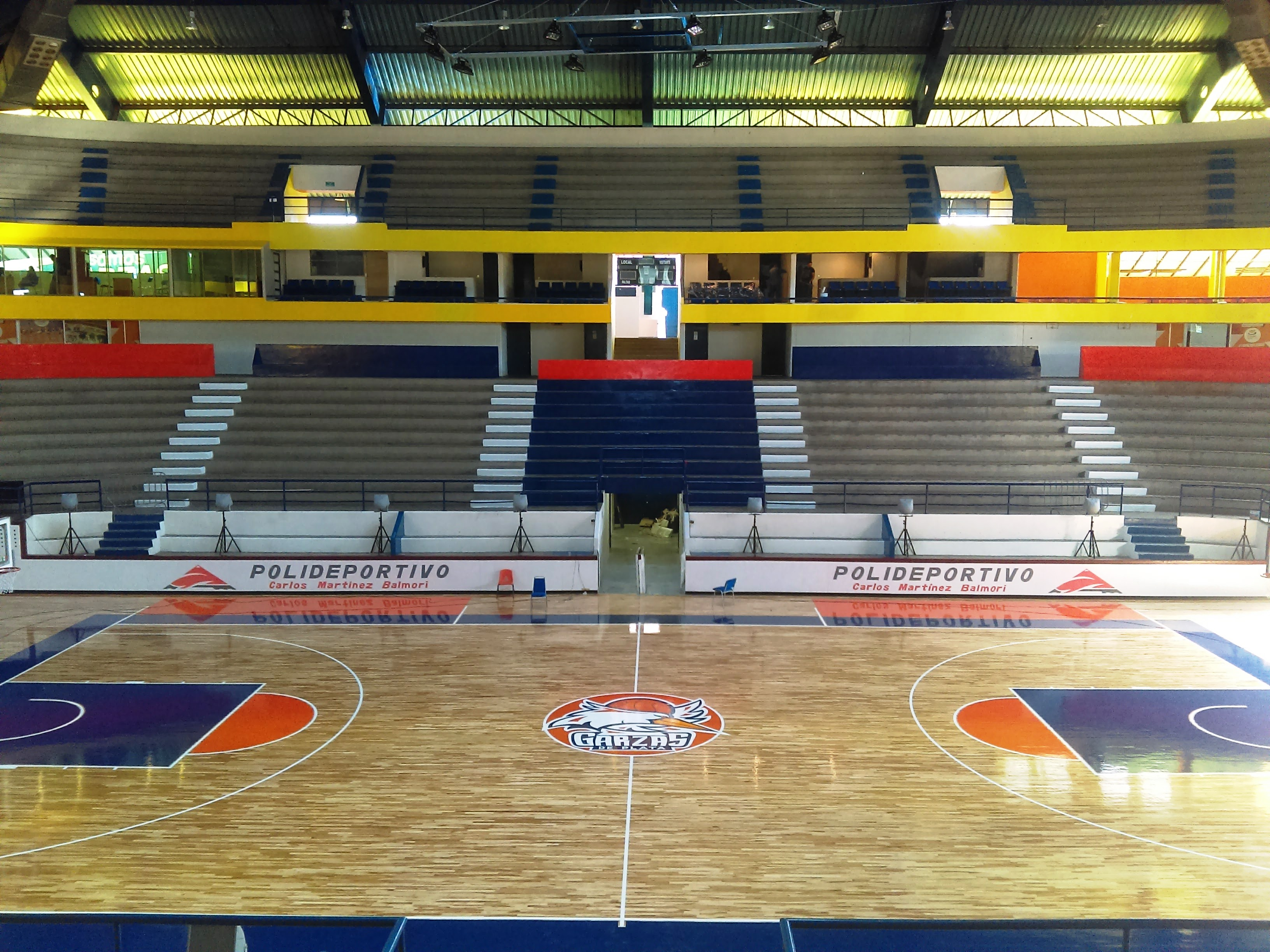 Polideportivo Universitario Carlos Martínez Balmori